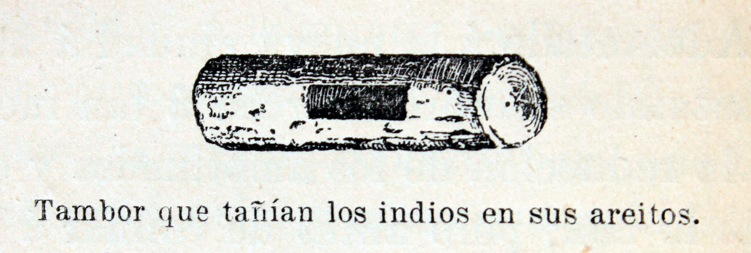 Ilustraciones de la obra : Cristóbal Colón : historia del descubrimiento de América / por Francisco Serrato ; con un prólogo de Roque Chabas. - Madrid : El Progreso Editorial, 1893